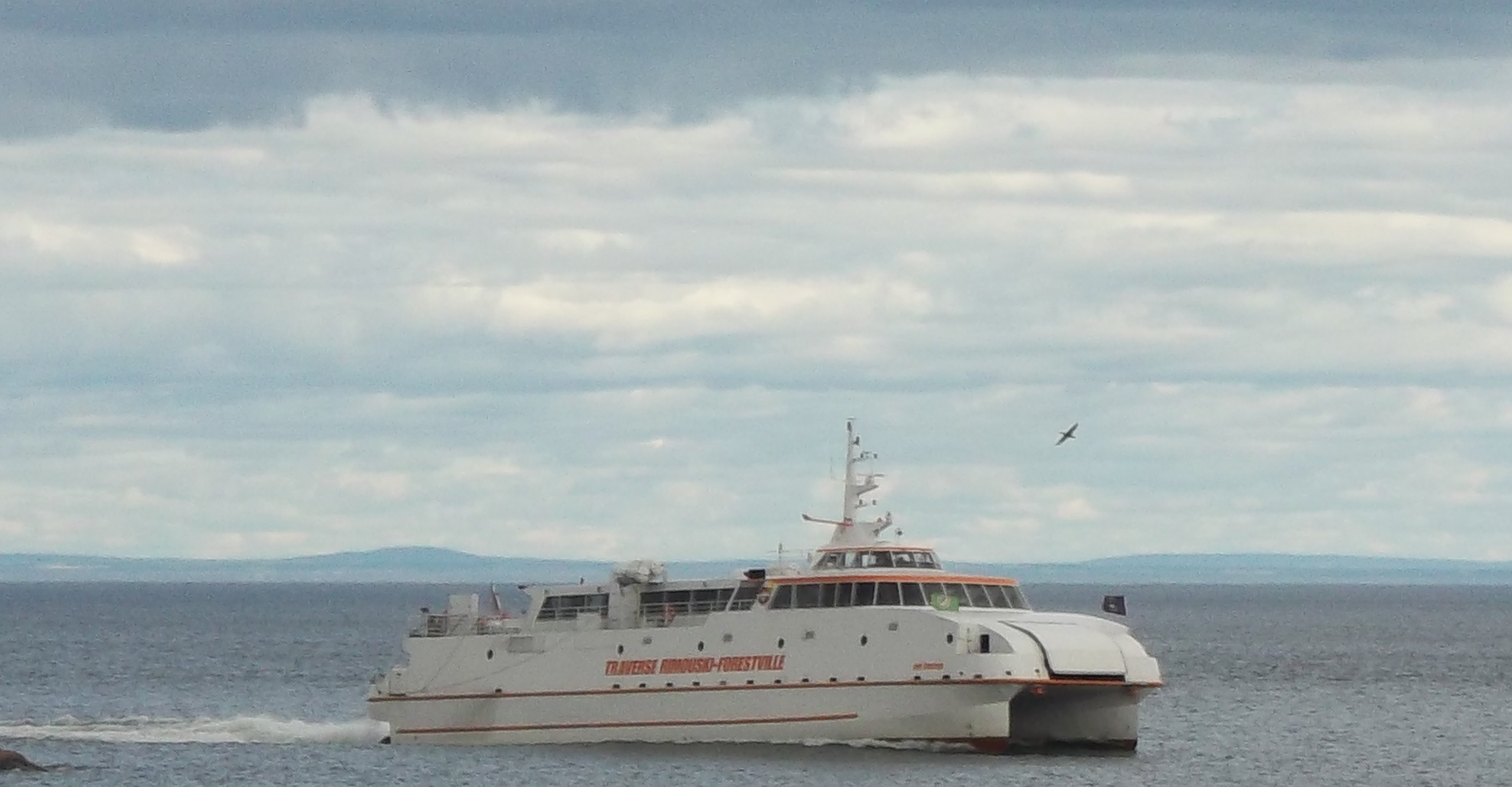 Le CNM Évolution arrivant au port de Forestville